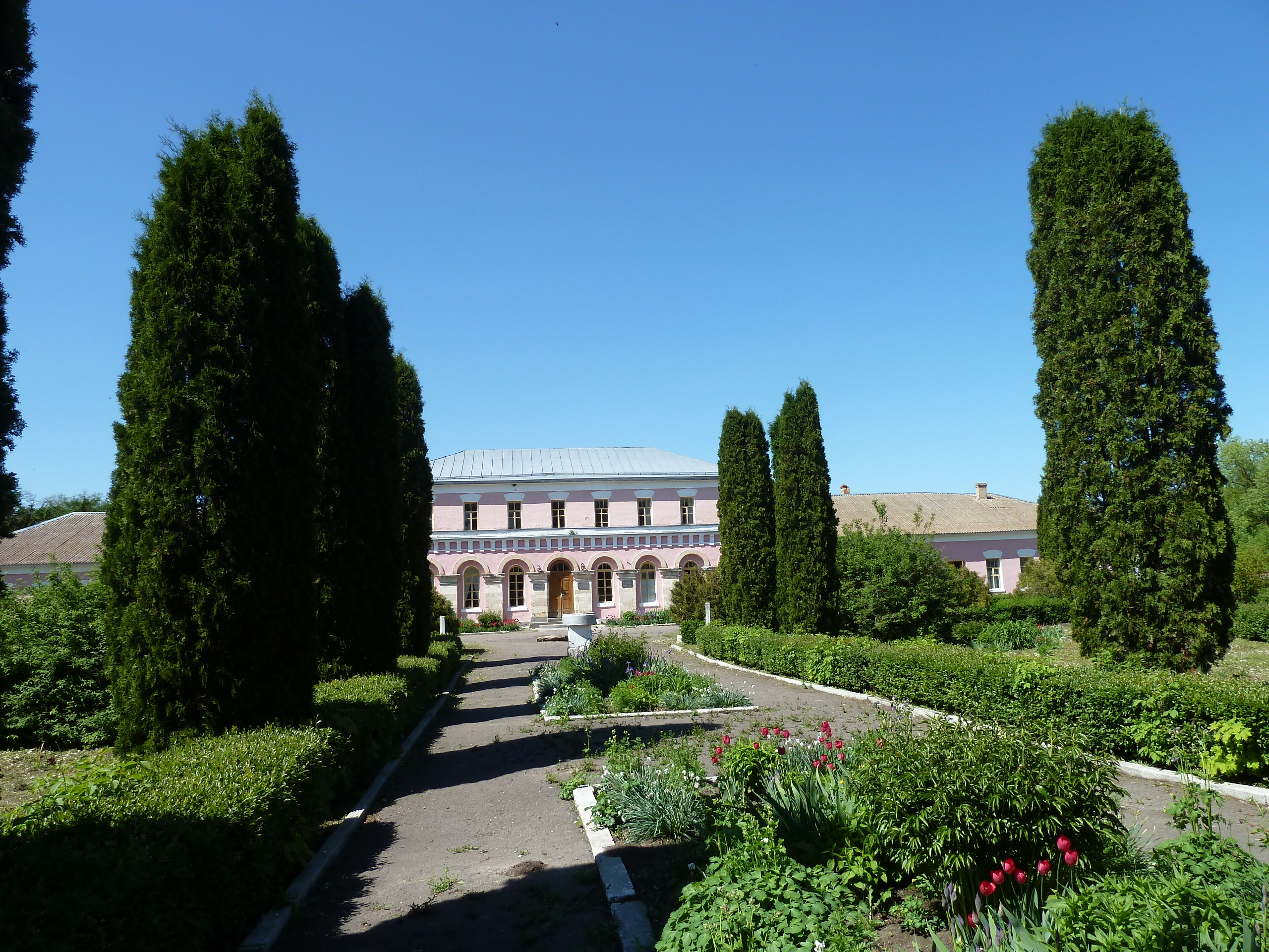 Дом бывшего управляющего Ф. Х. Майера в усадьбе Шатиловых